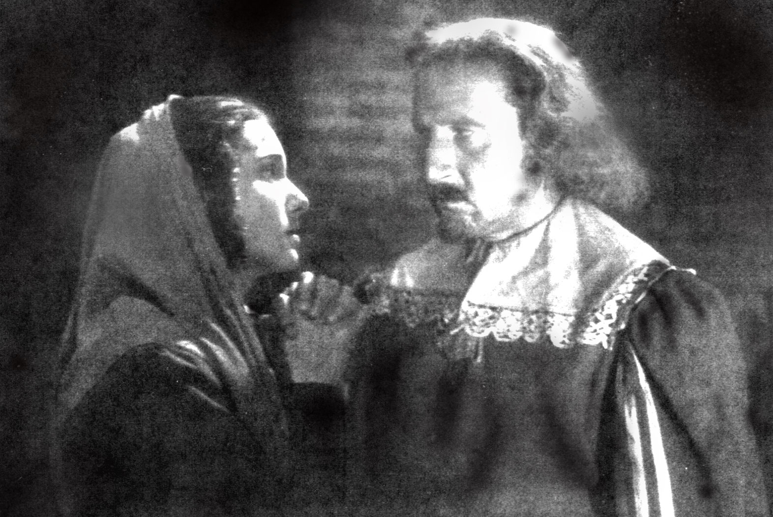 Dina Sassoli e Carlo Ninchi ne "I promessi sposi" (Camerini, 1941)